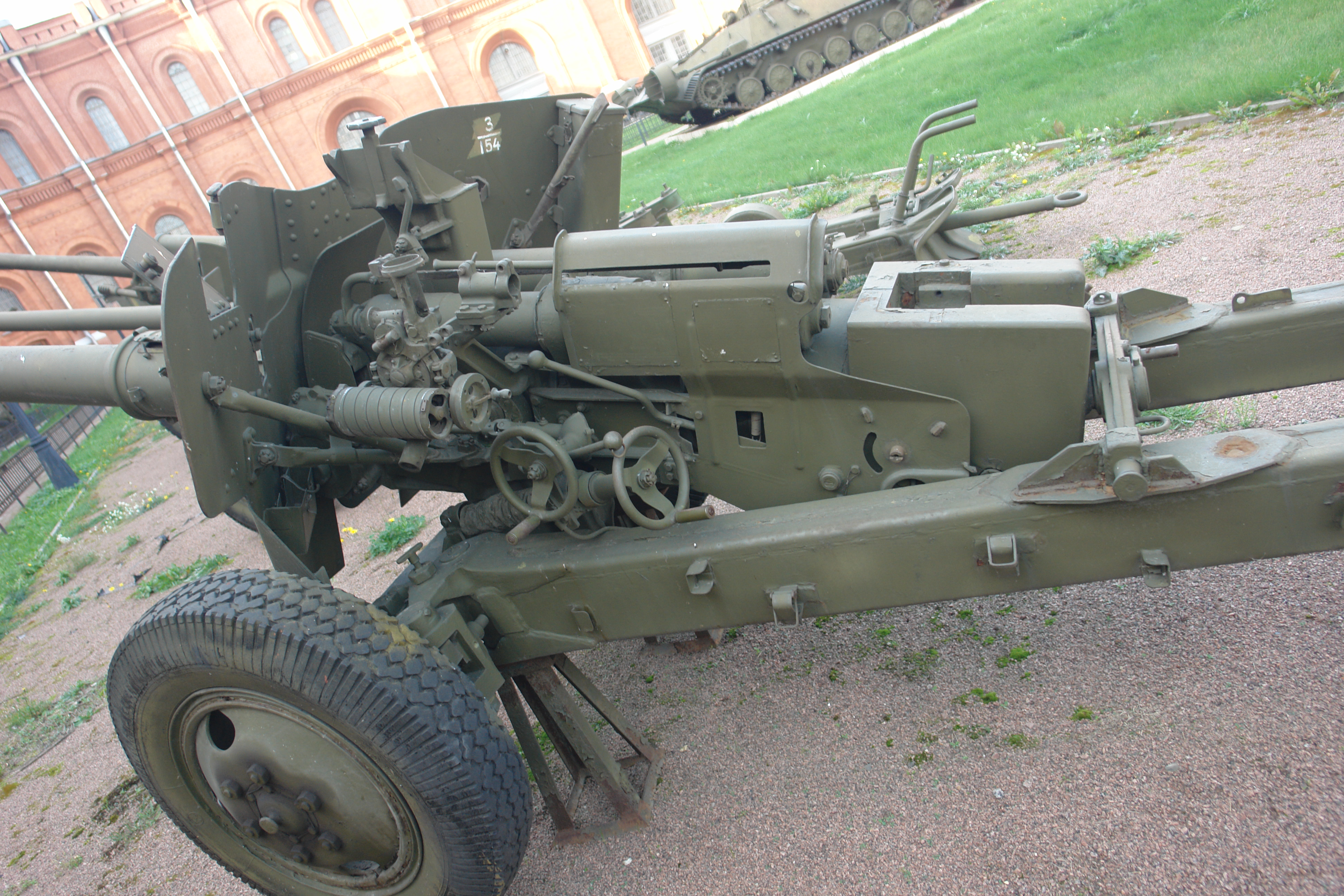 100-мм ПРОТИВОТАНКОВАЯ ПУШКА Т-12 (2А19) "РАПИРА" ПРИНЯТА НА ВООРУЖЕНИЕ В 1961 г. ГЛАВНЫЙ КОНСТРУКТОР Г.И.ЛУКЬЯНЧЕНКО. lbHOCTb, M: СТРЕЛЬБЫ-6000, ПРЯМОГО ВЫСТРЕЛ СКОРОСТРЕЛЬНОСТЬ - ДО 14 ВЫСТР/МИН. МАССА ОРУДИЯ-2800. РАСЧЕТ - 7 ЧЕЛОВЕК. Военно-исторический музей артиллерии, инженерных войск и войск связи, Санкт-Петербург.